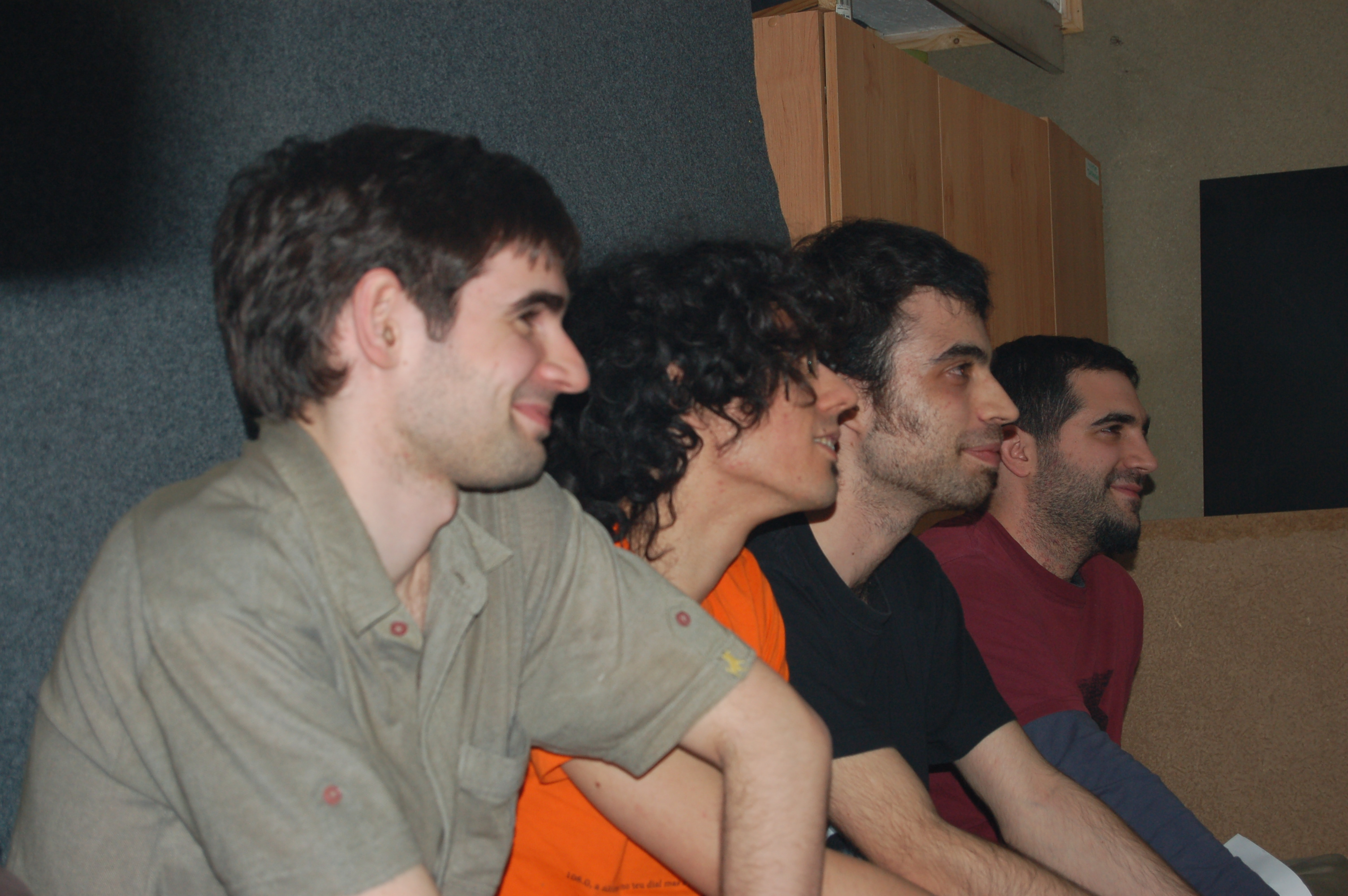 Ataque Escampe vendo un concerto na Gentalha do Pichel